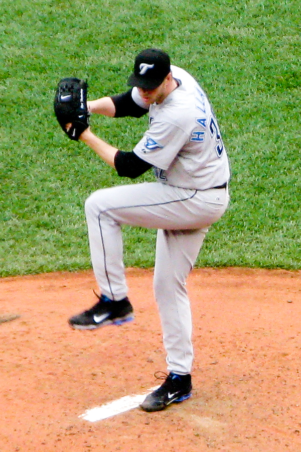 Roy Halladay